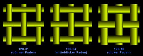 Gewebegeometrie Siebdruckgewebe